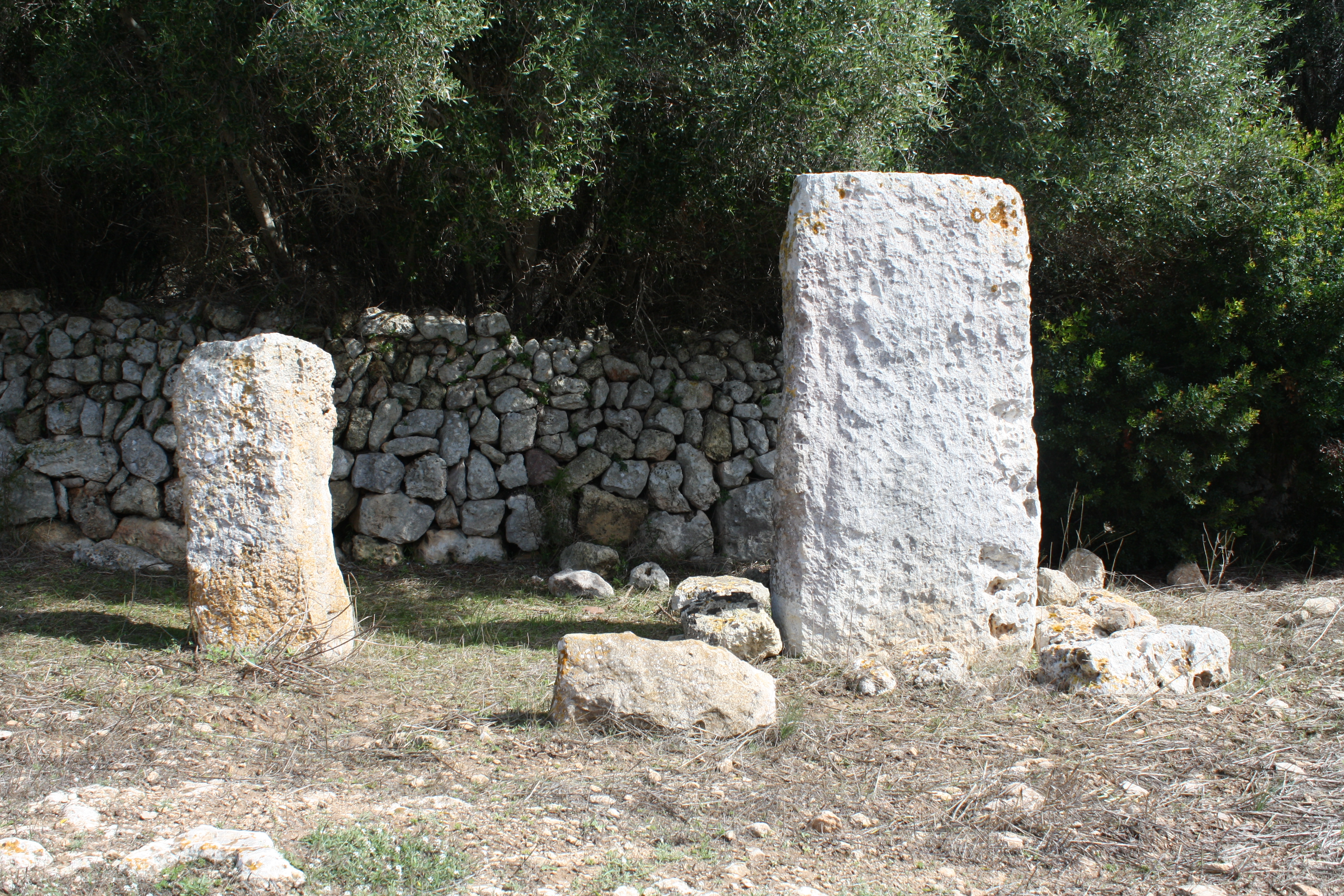 Talayotisches Dorf von Sant Agustí: Pfeiler der früheren Taula